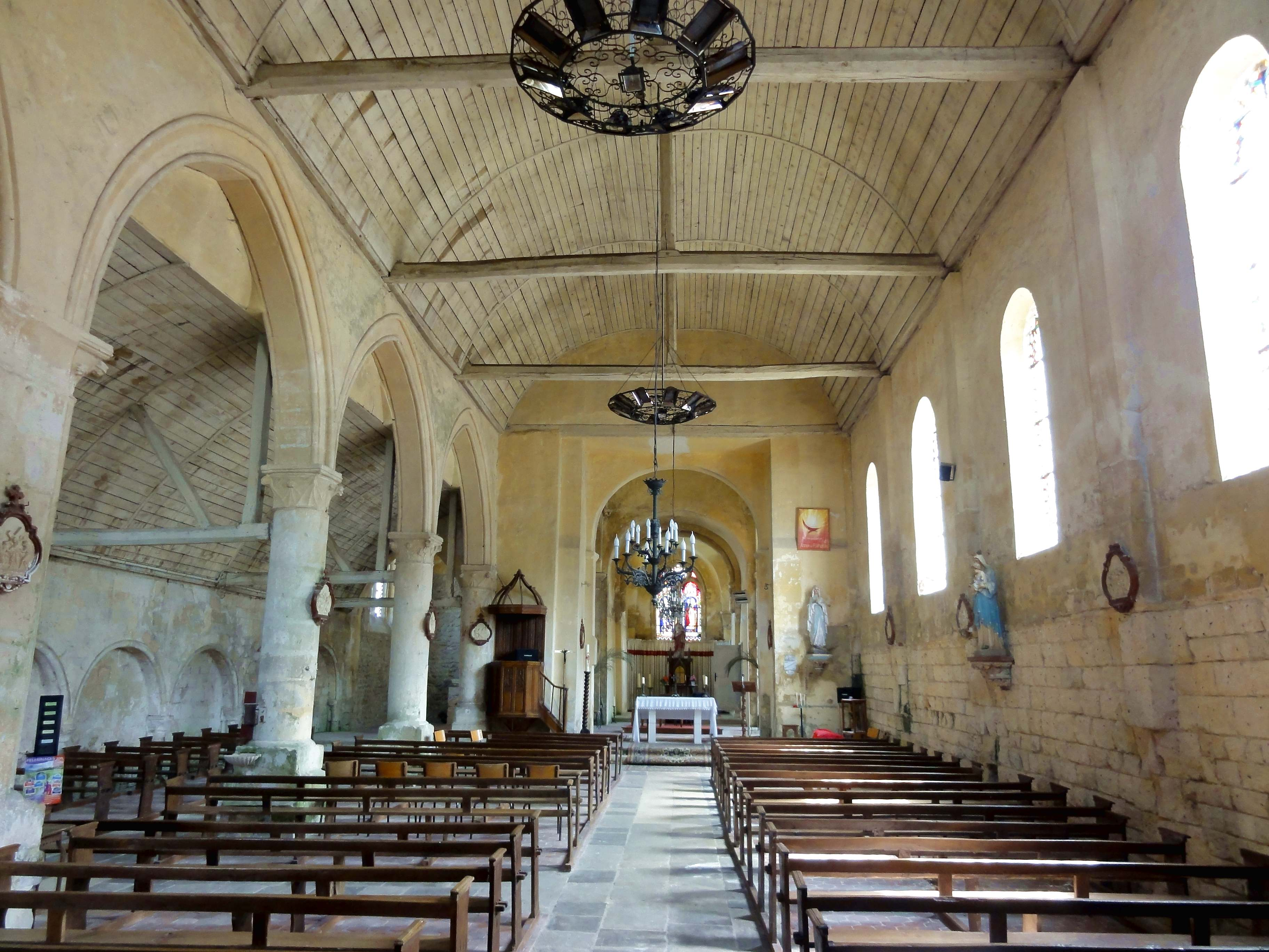 Intérieur de l'église (voir titre).